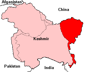 eigen kaartje (herbewerking Kashmir kaart, zie nl::commons:File:Kashmir map NL.png